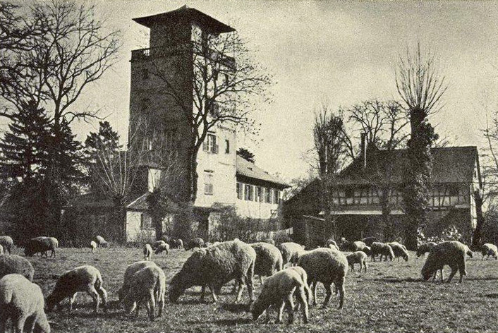 Koenigshoffen - Le Schnokeloch. Bibliothèque nationale et universitaire de Strasbourg